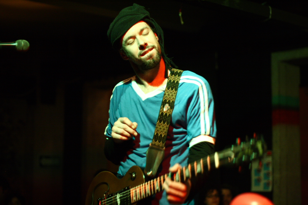 De su presentación en el Pasagüero. Alejandro Otaola es uno de los ex-integrantes del grupo Santa Sabina y La Barranca (por mencionar solo algunos), en esta ocasión acompañando a Alonso Arreola en su proyecto como solitario/colectivo Laba Música Horizontal.